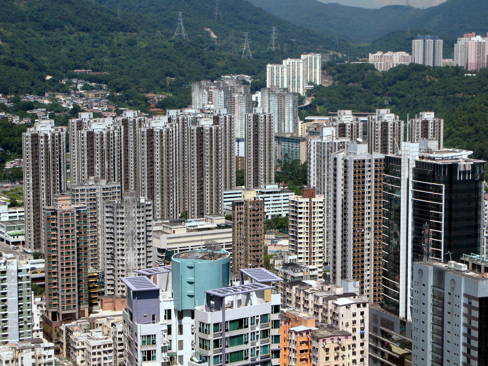 HK Luk Yeung Sun Chuen